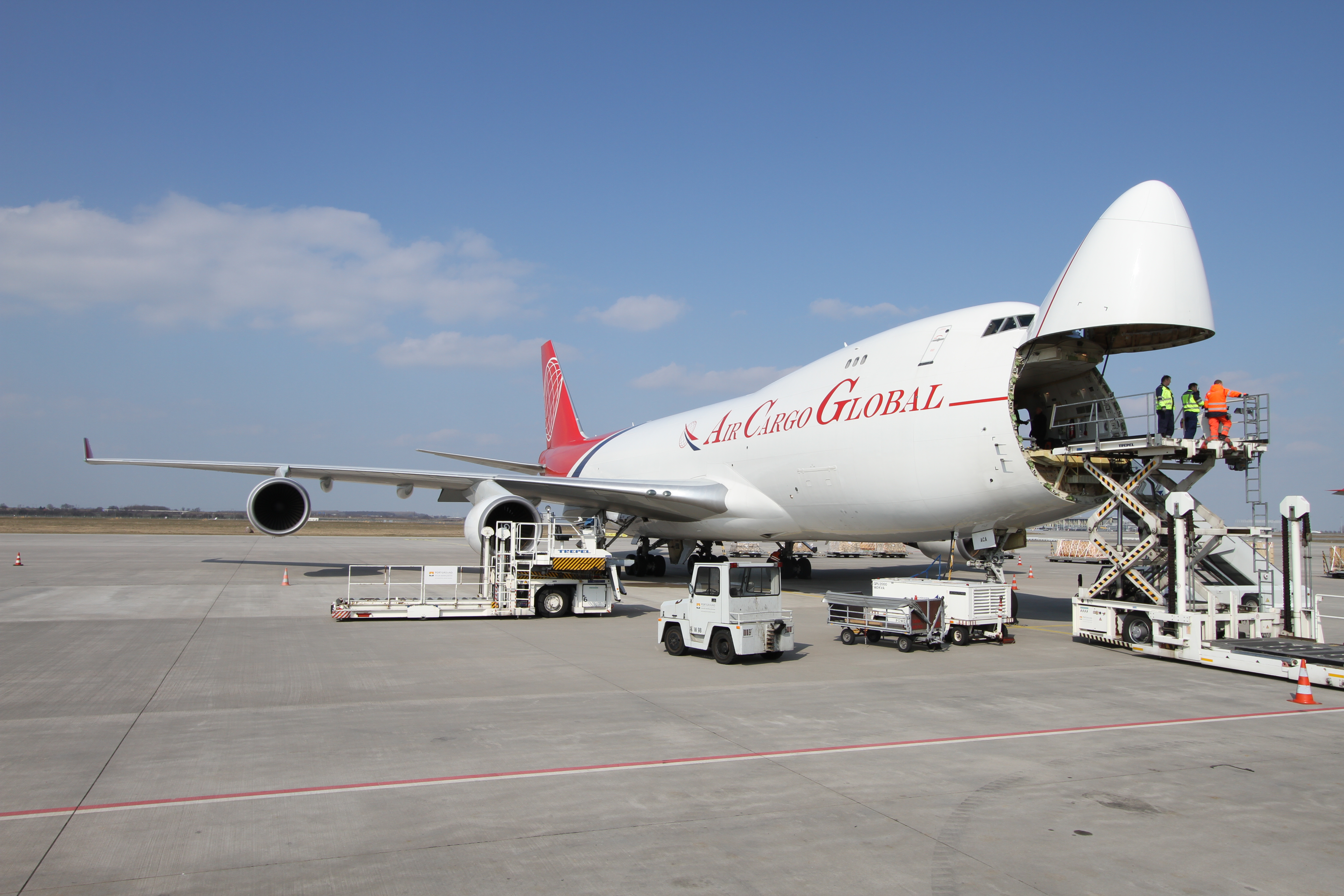 Boeing 747-400